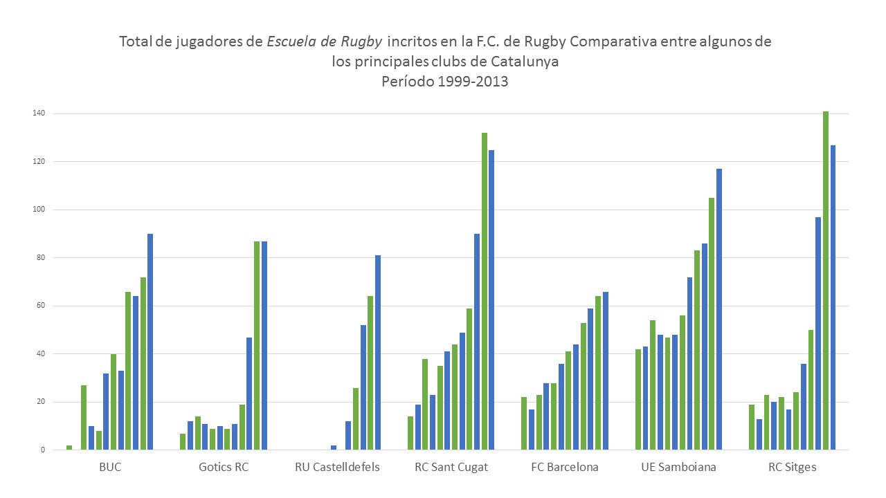 Figura comparativa de la evolución de las Escuelas de Rugby en Catalunya entre 1999-2013